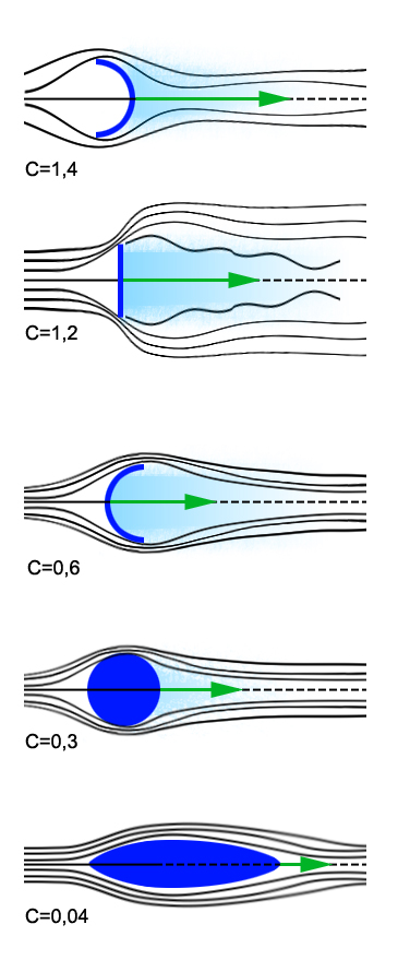 Resistenza di forma al variare della forma dei corpi